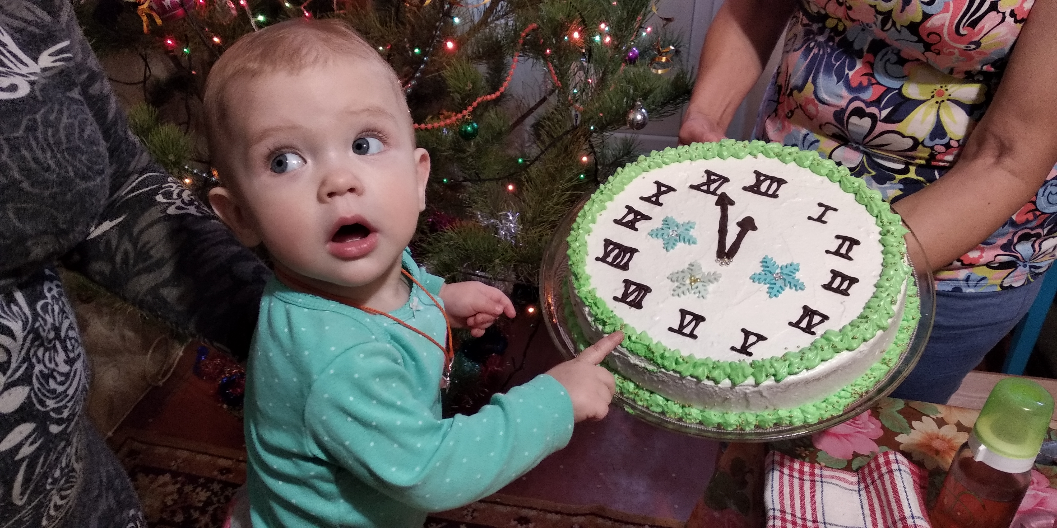 В 12 месяцев младенец отзывается на имя, полностью реагирует на окружающую среду